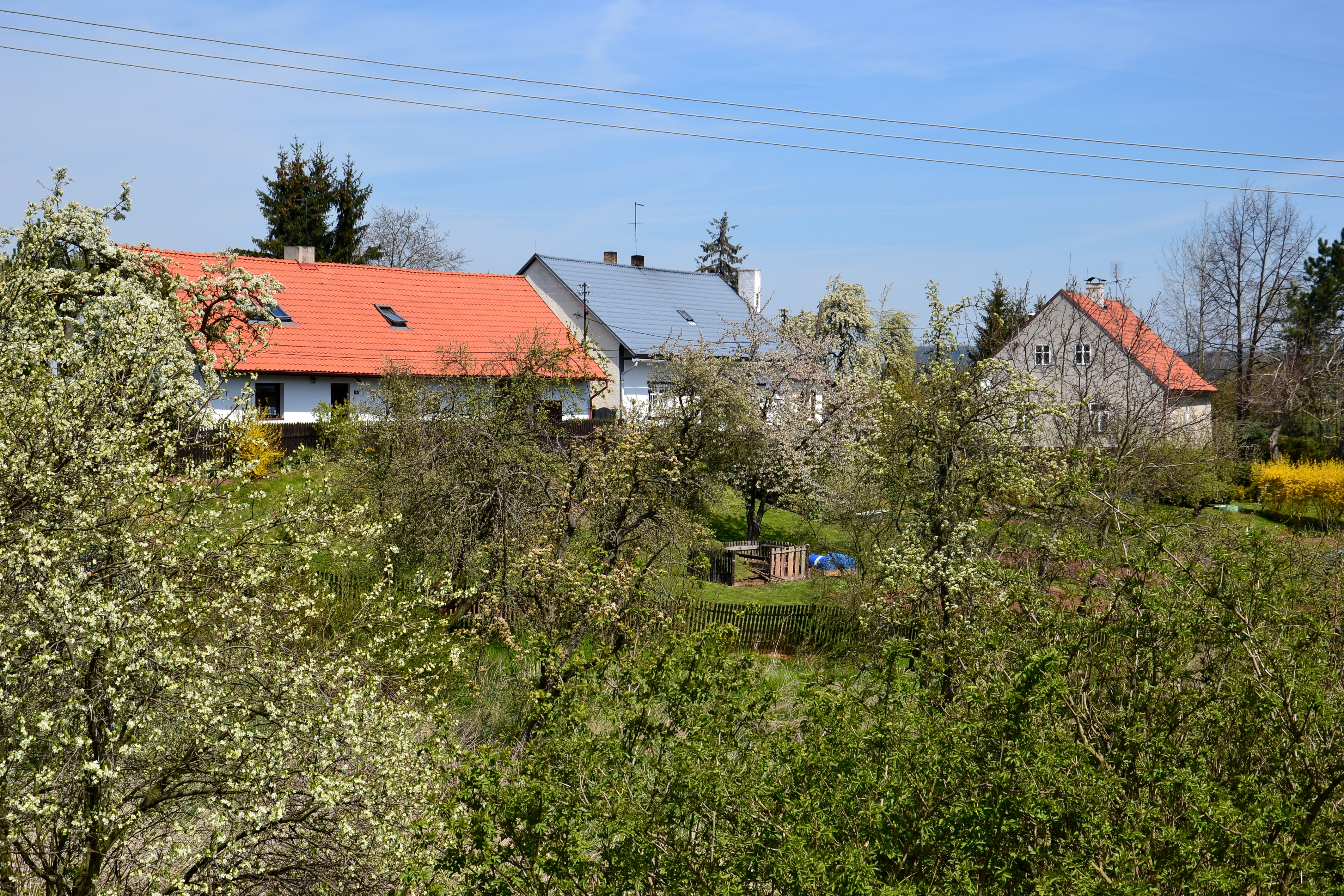 Celkový pohled